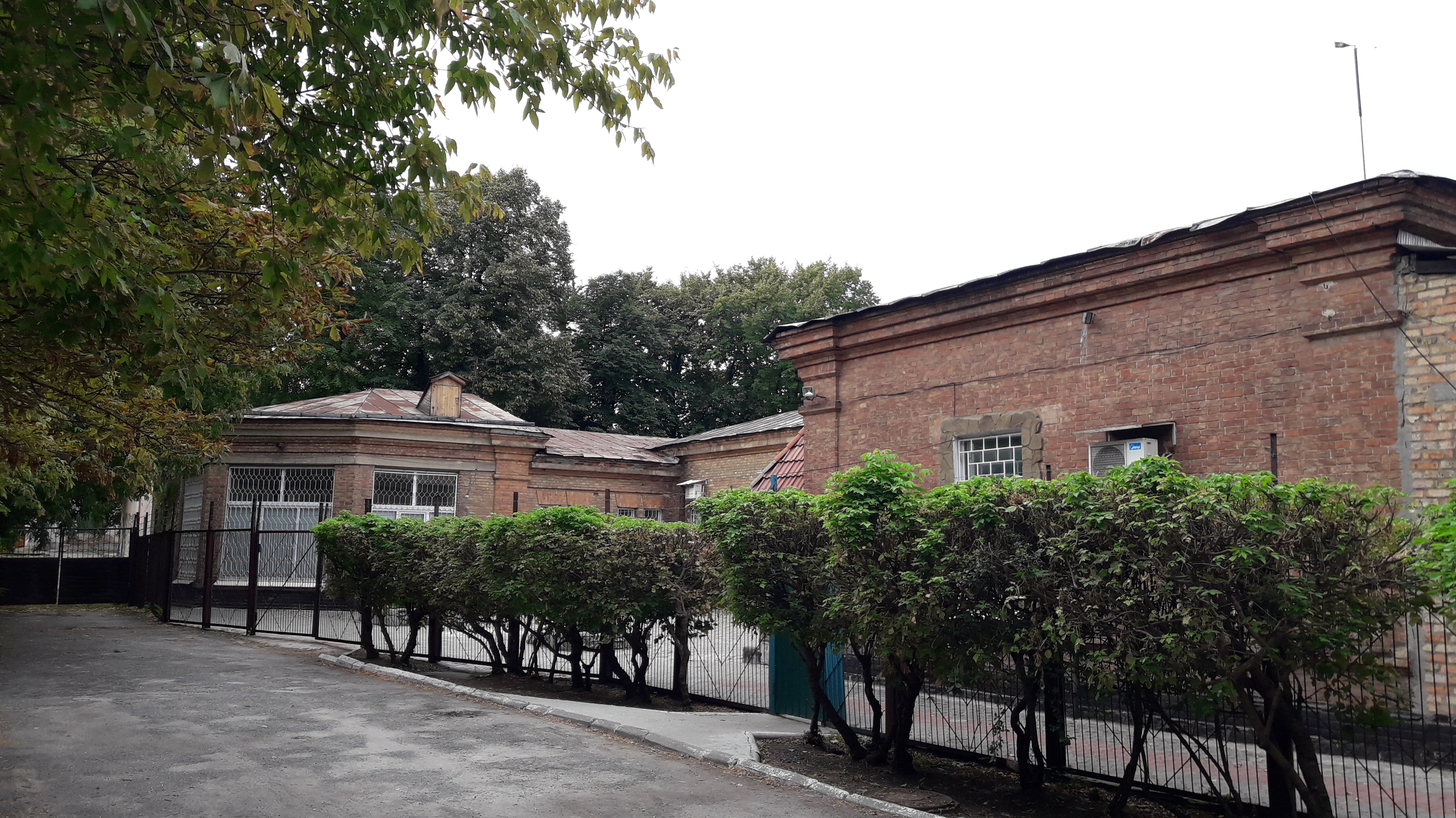 Будинок залізничної лікарні - місце боїв робітників з урядовими військами, Запоріжжя, вул. Барикадна, 18